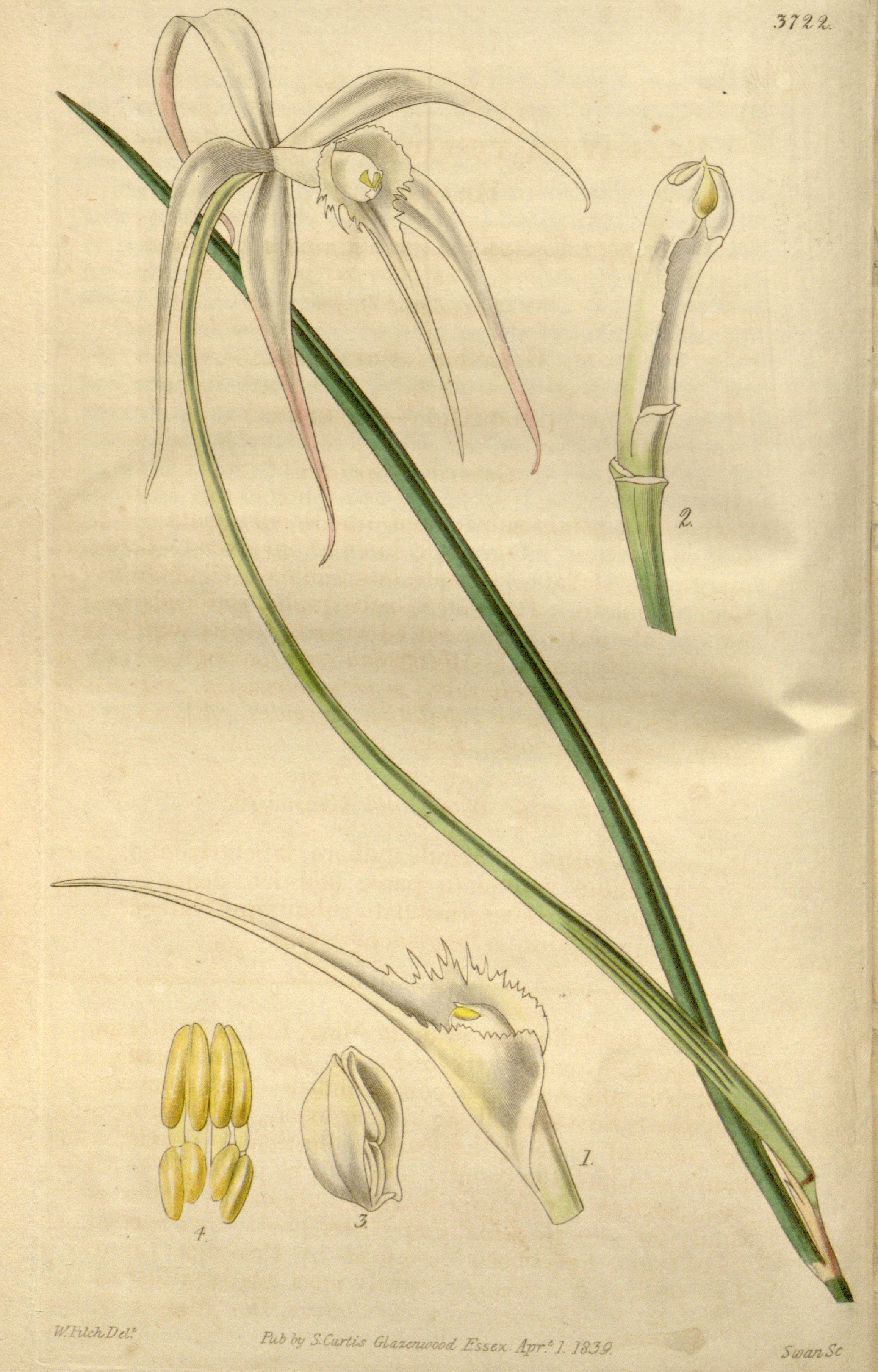 Illustration of Brassavola cucullata (as syn. Brassavola cuspidata)